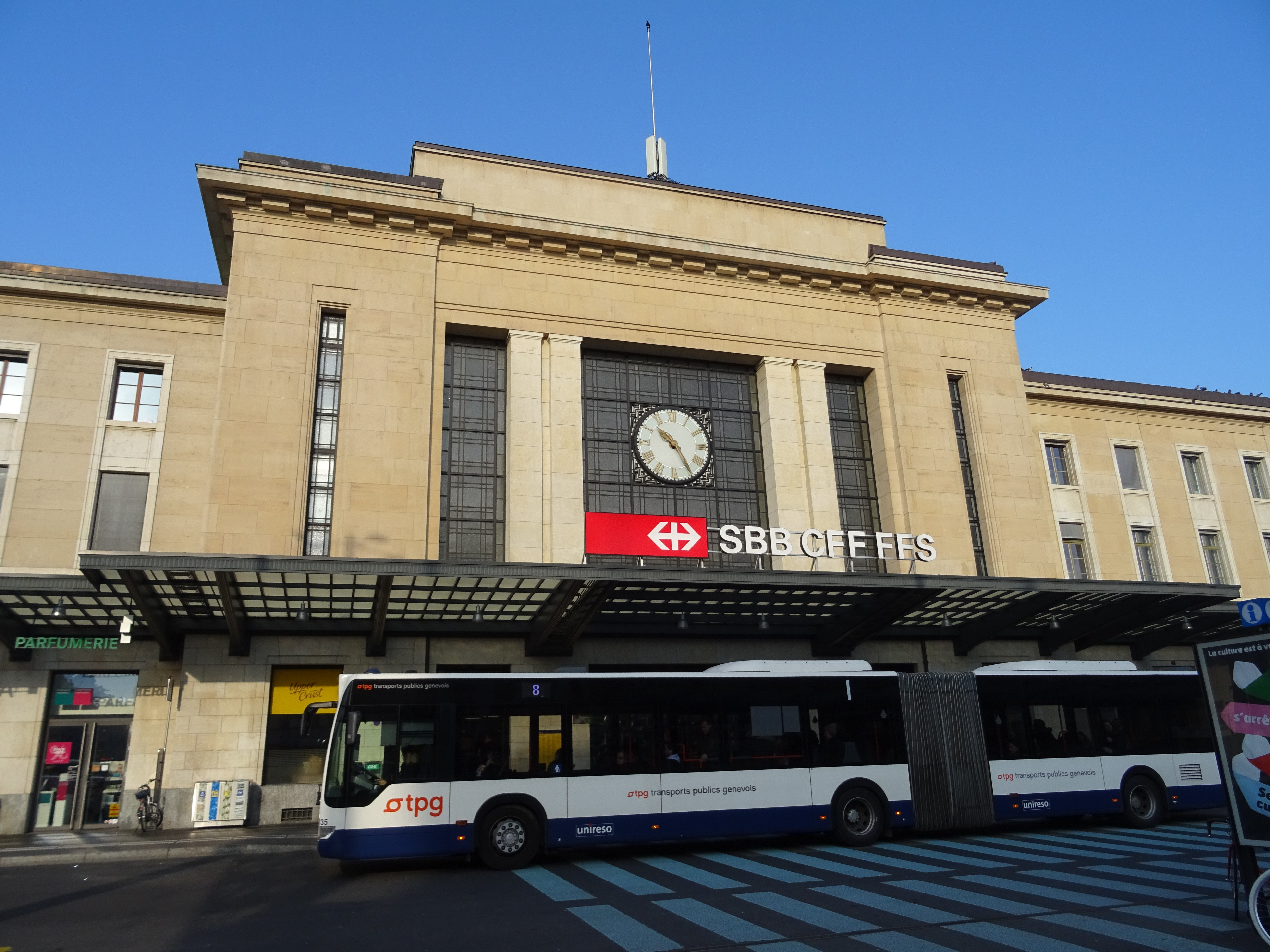 Entrée principale de la gare de Genève-Cornavin avec un bus des TPG.